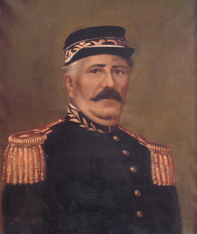 Azevedo Dutra: Retrato do General Antônio de Sousa Neto, óleo sobre tela, século XIX. Acervo do Museu Júlio de Castilhos, Porto Alegre, Brasil. O canto superior direito foi retocado com Photoshop devido a perdas na camada pictórica